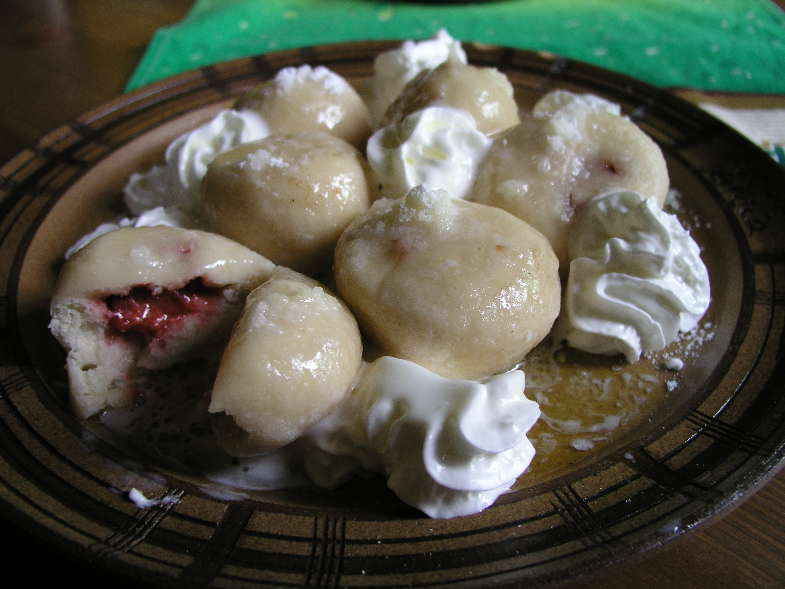 "(Ovocné) tvarohové knedlíky plněné jahodami", served Zoopark Zelčín 2008-04-19